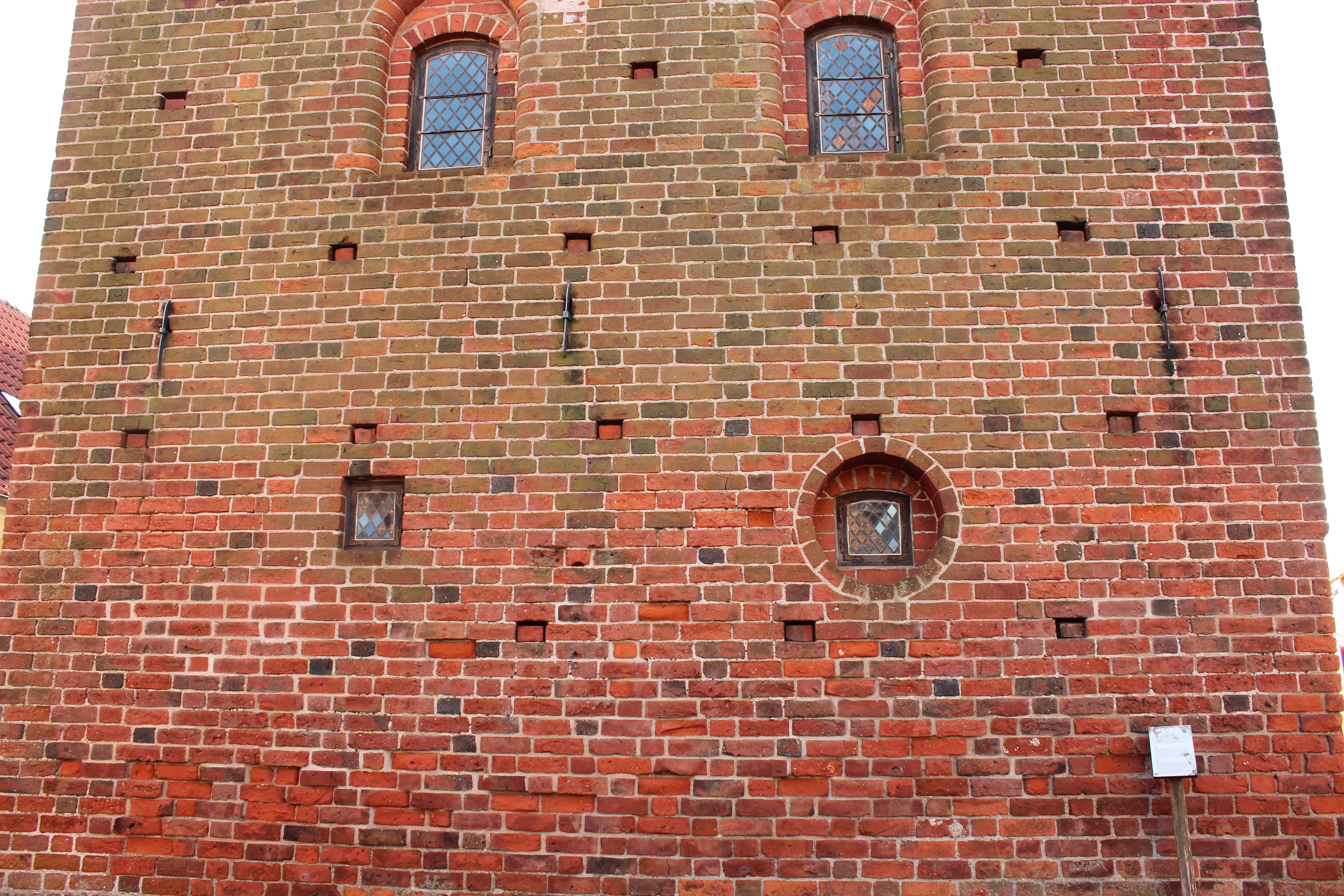 Vinduer i facaden mod Præstegade.